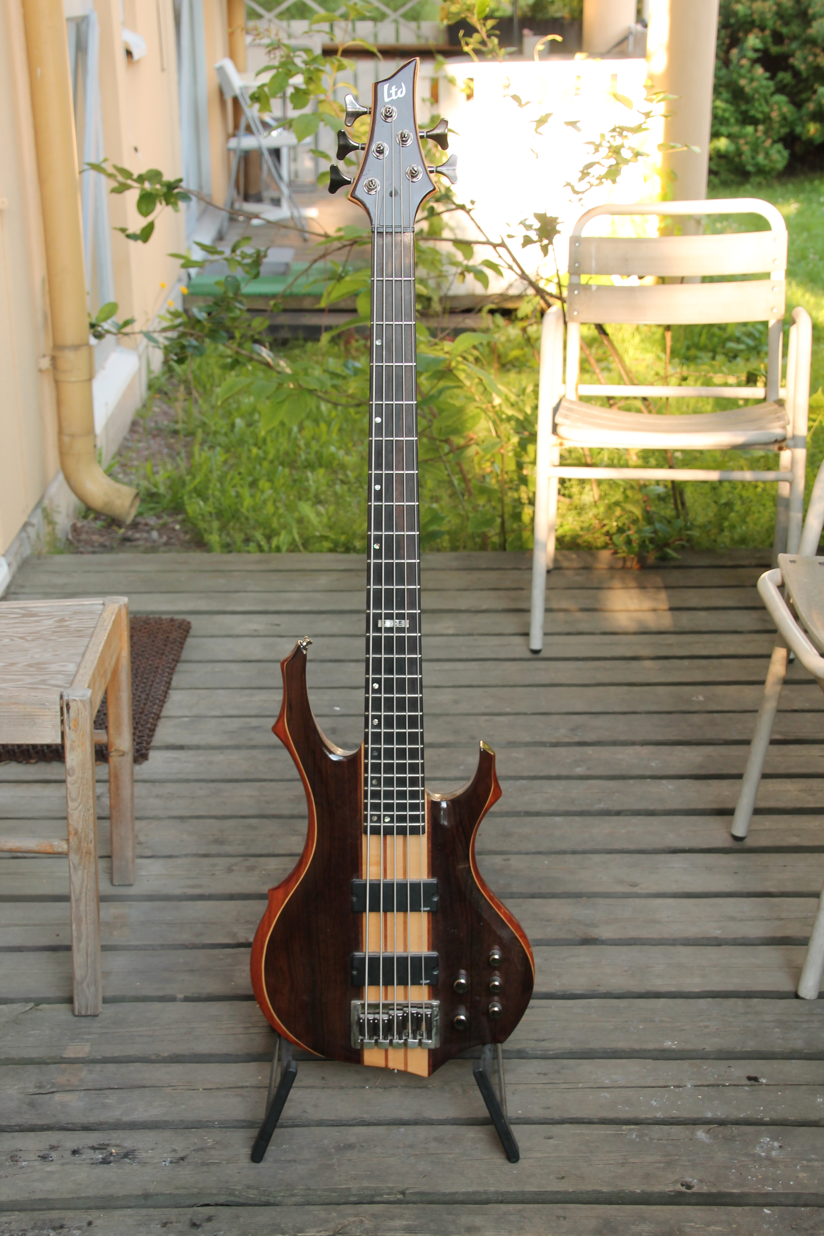 ESP-LTD F-series five string bass guitar. Neck-thru construction.